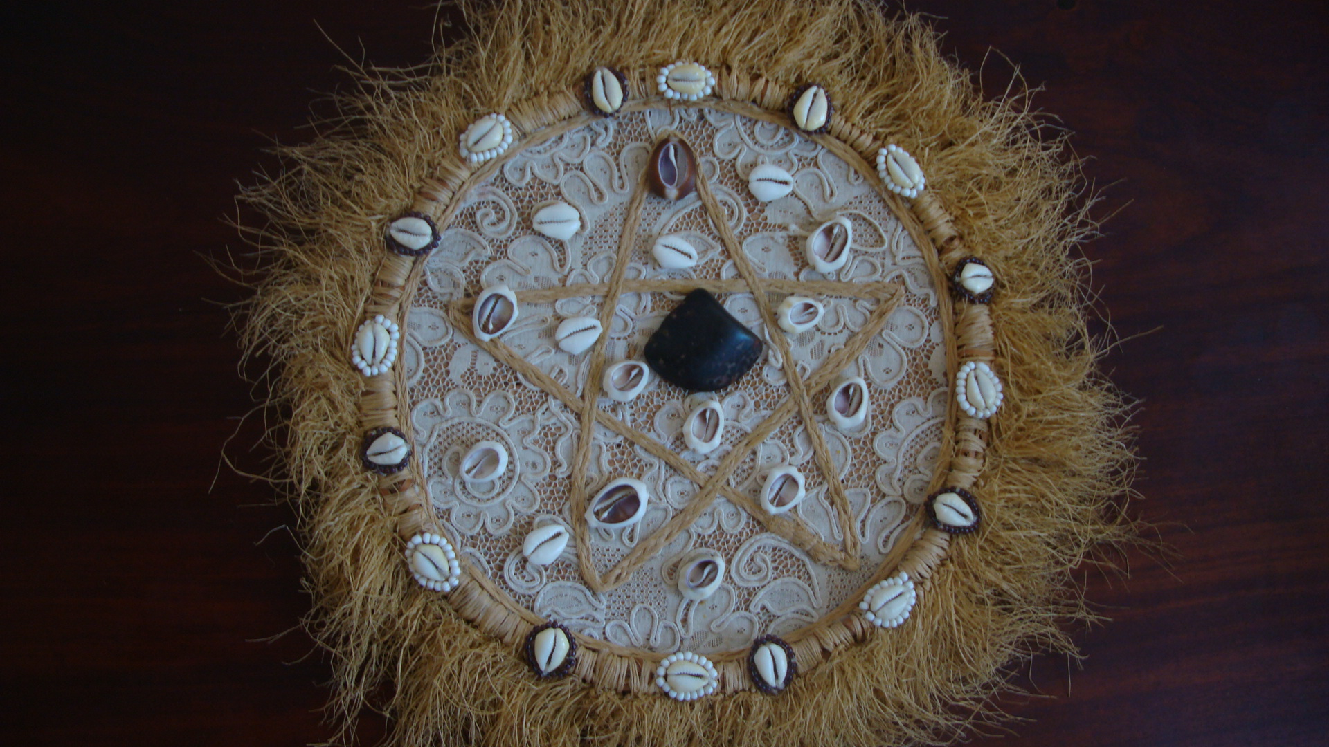 Cinco búzios abertos, Odu Ôxê, Merindilogun, Candomblé, Salvador, Bahia, Brasil.